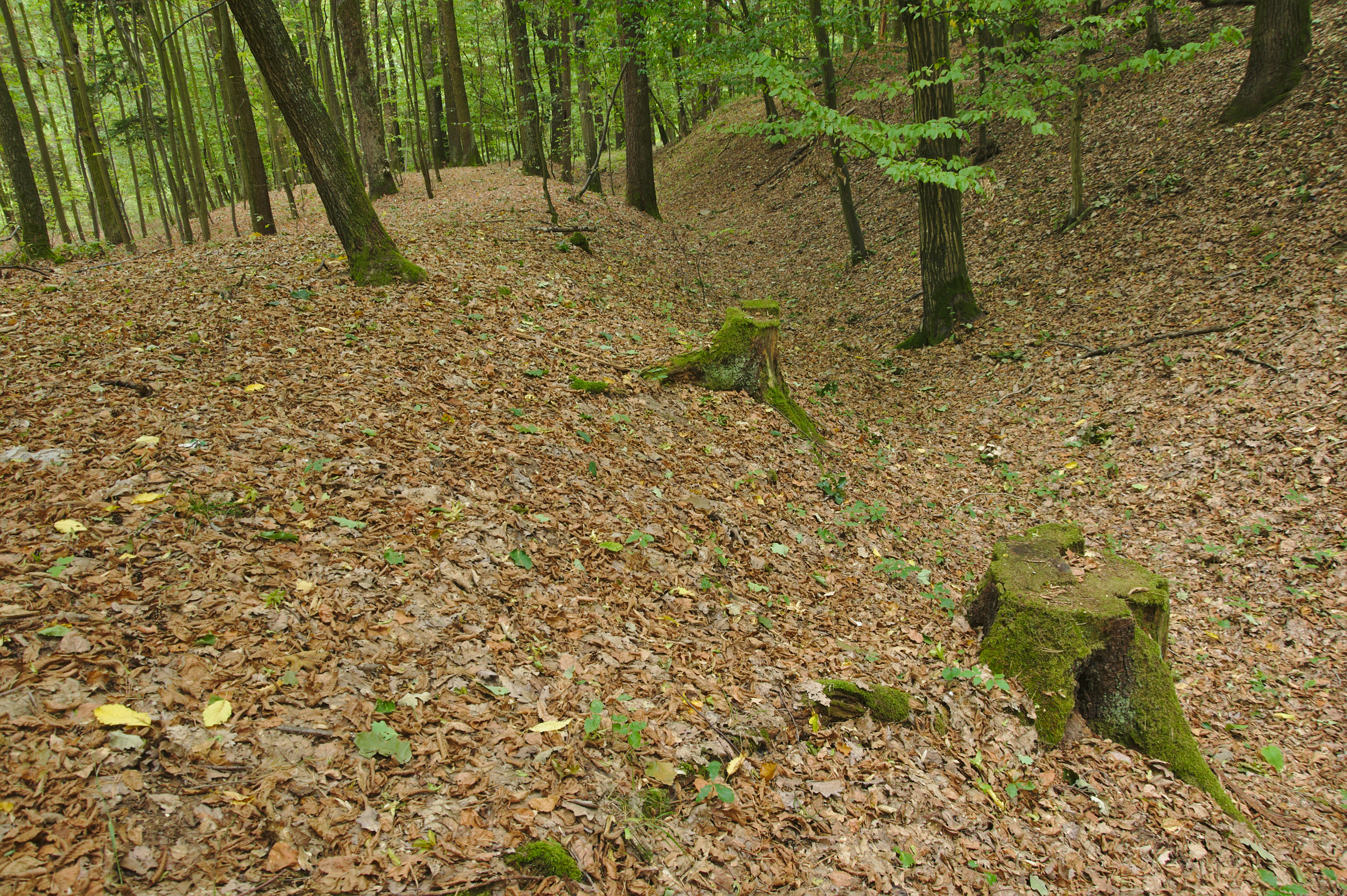 Hrad u Bílovic, Bílovice-Lutotín, okres Prostějov